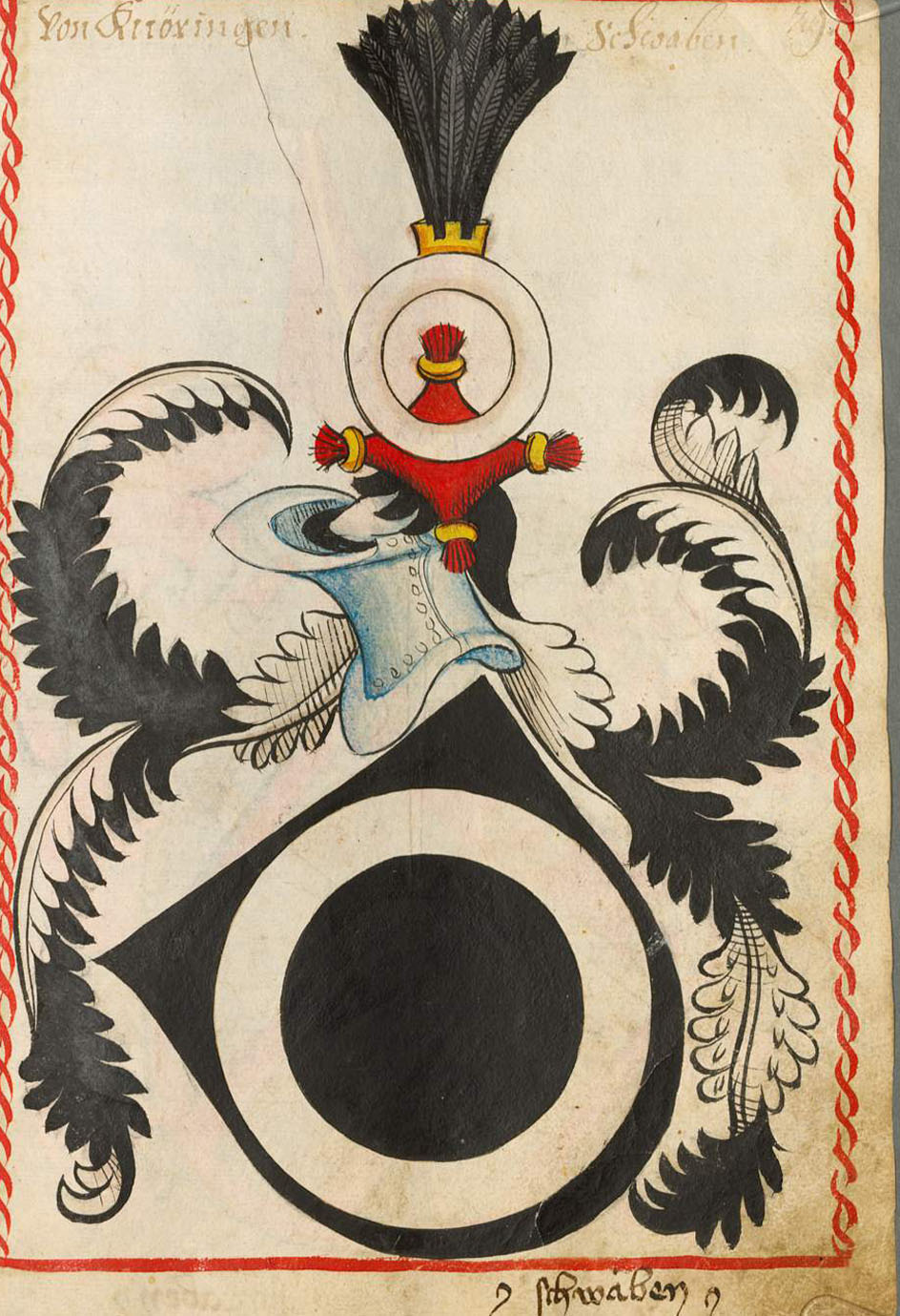 Scheibler'sches Wappenbuch, älterer Teil Wappen der Familie Knöringen.